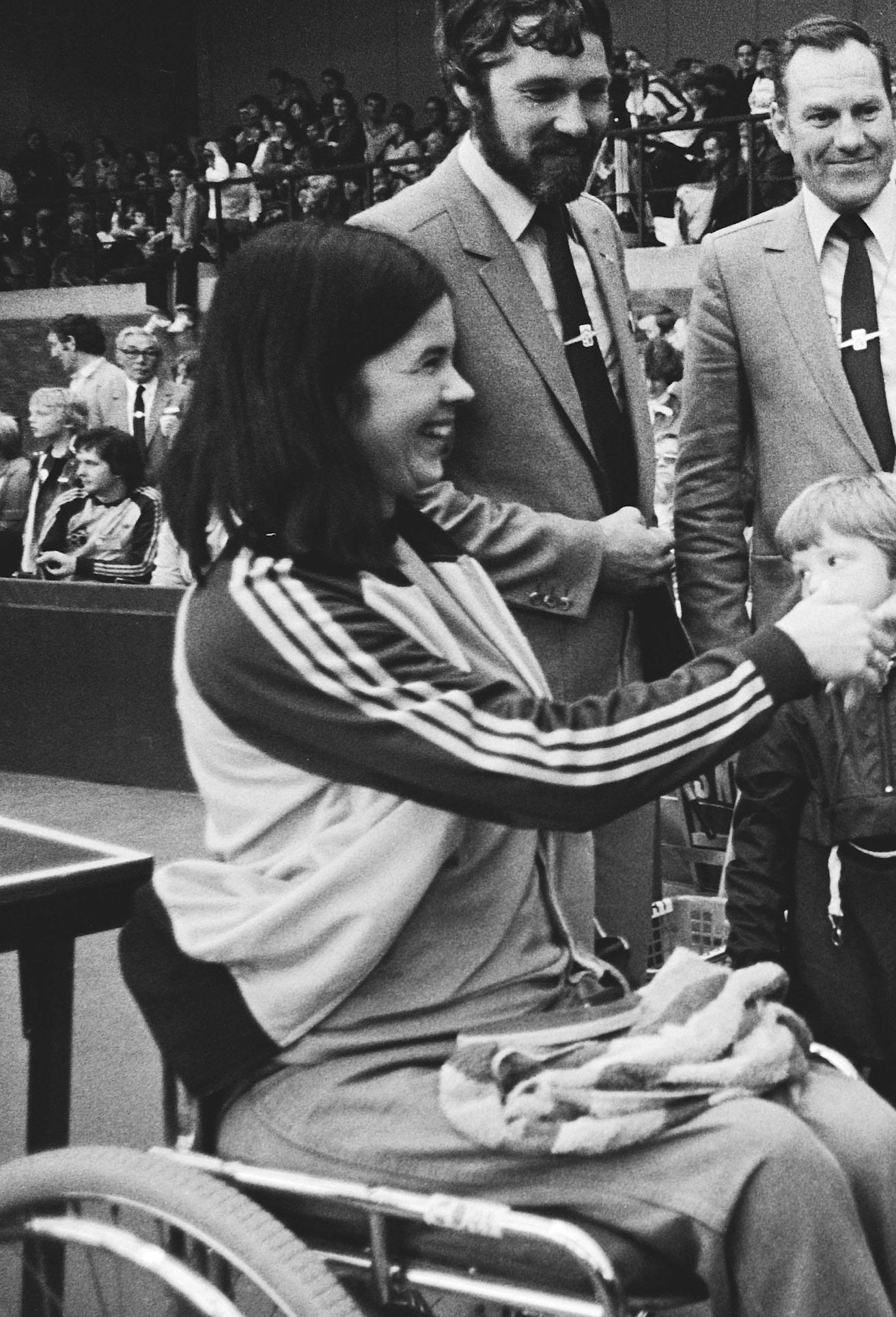 Olympische Spelen voor gehandicapten; Irene Schmidt